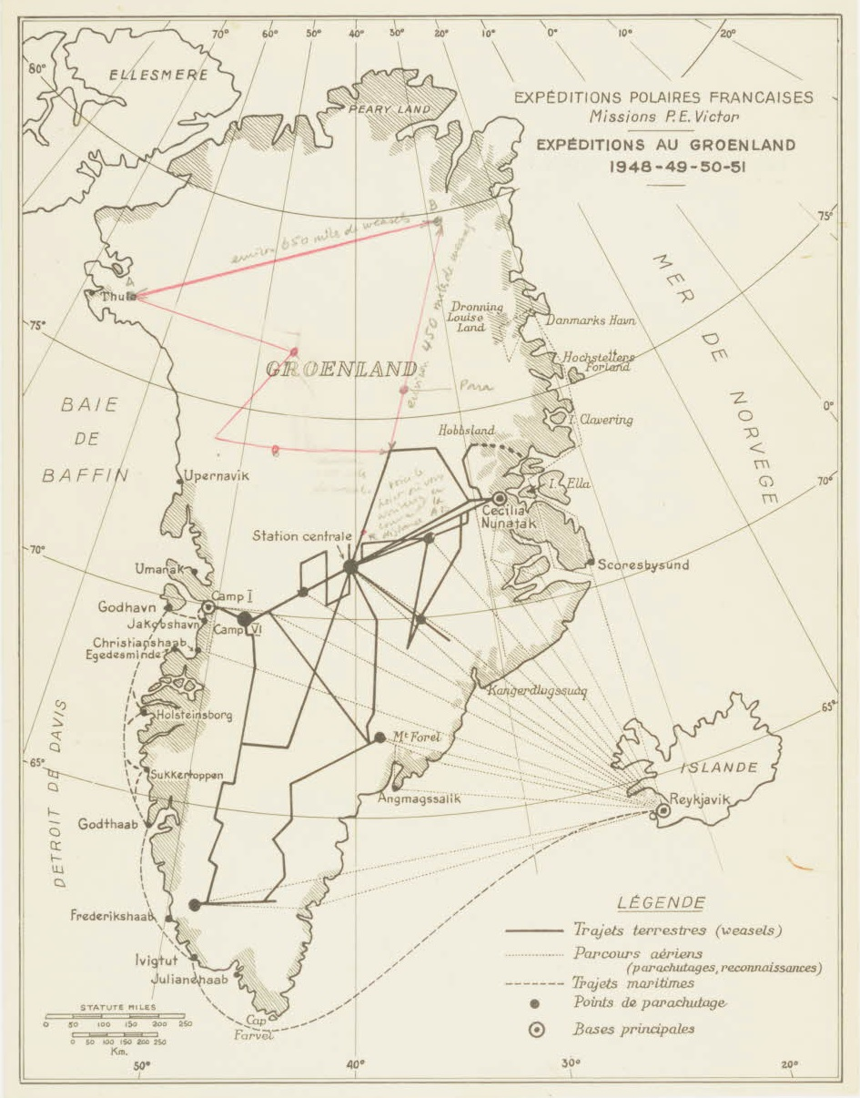 Expéditions polaires françaises. Expéditions au Groenland en 1948-1951. Carte des trajets